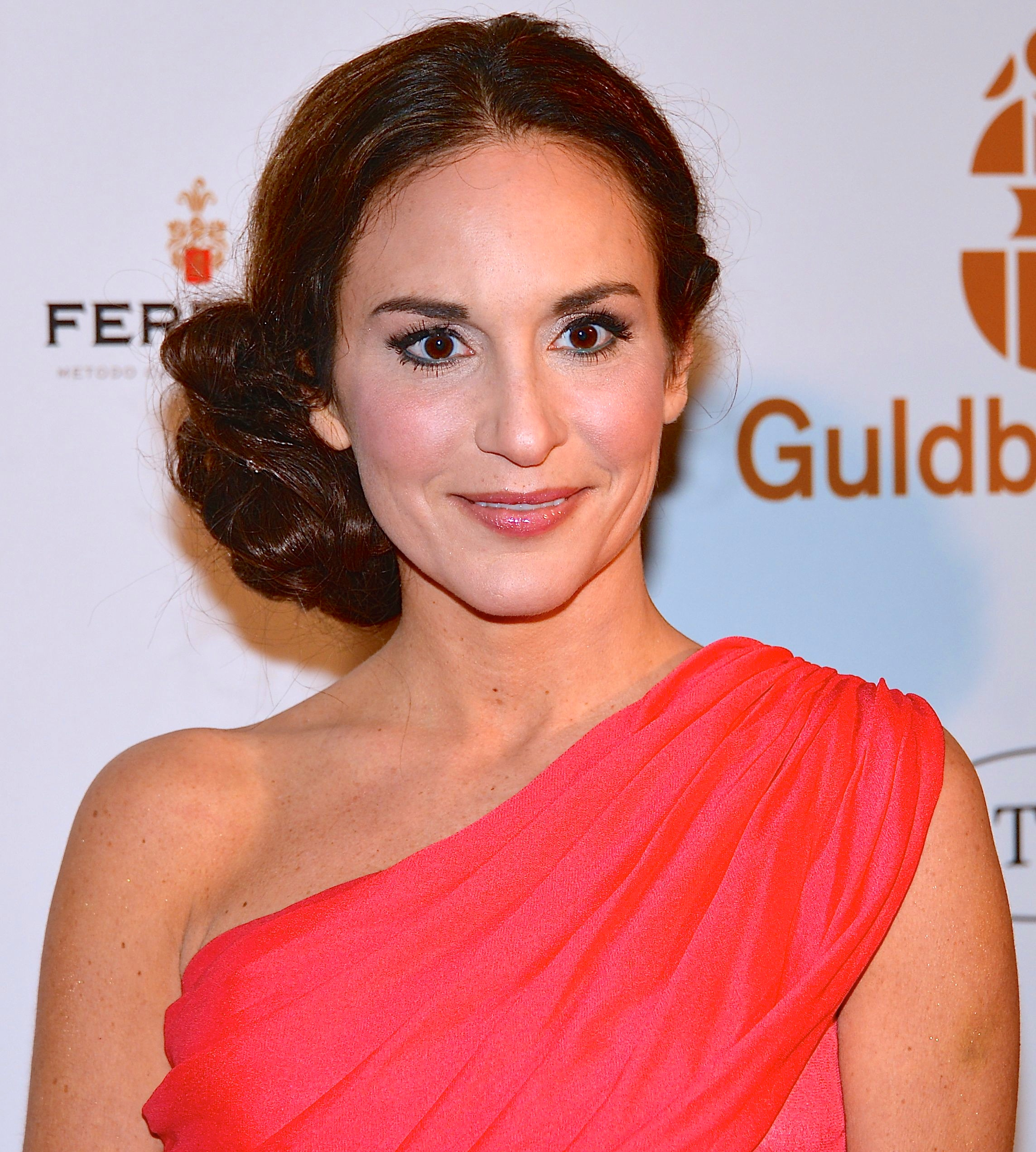 Alexandra Rapaport på på Guldbaggegalan 2013 den 21 januari 2013.